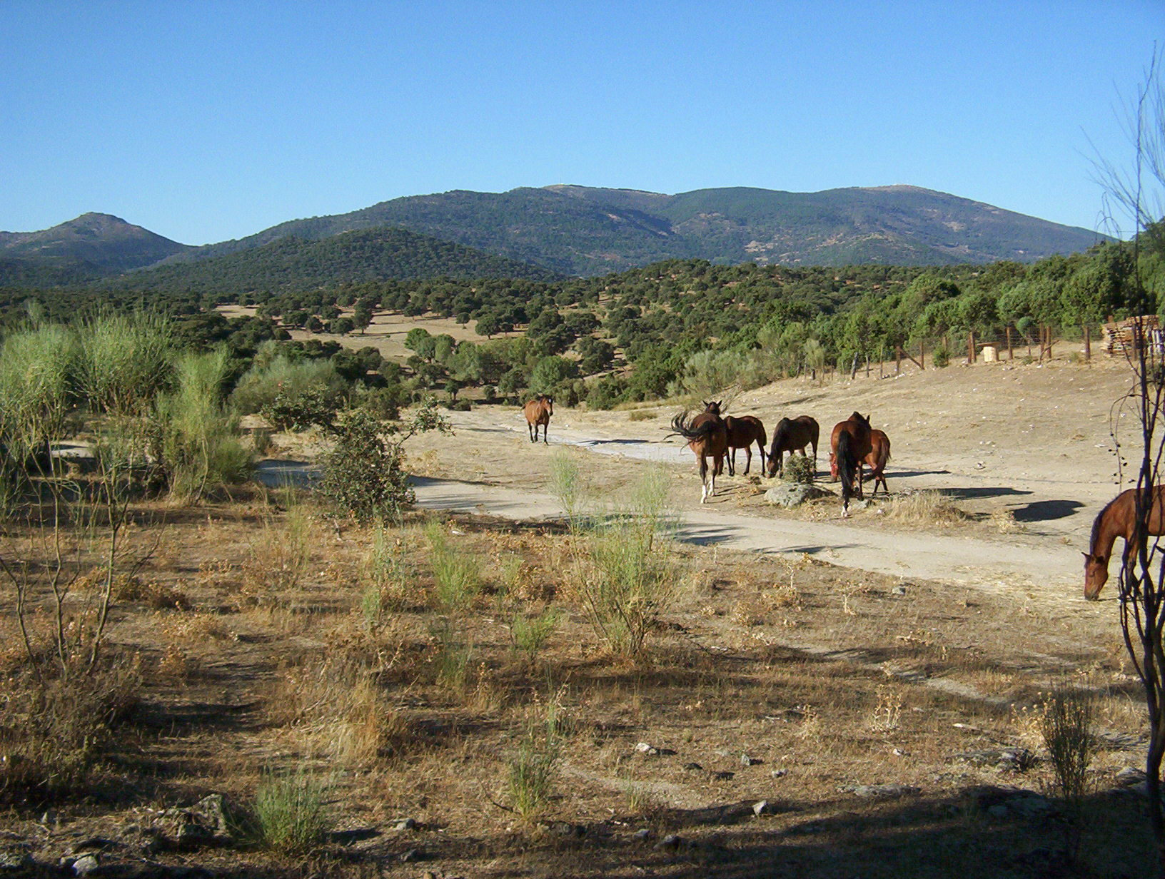 Cara norte de la Sierra de San Vicente vista desde la Cañada Real Leonesa Oriental, Toledo (España)